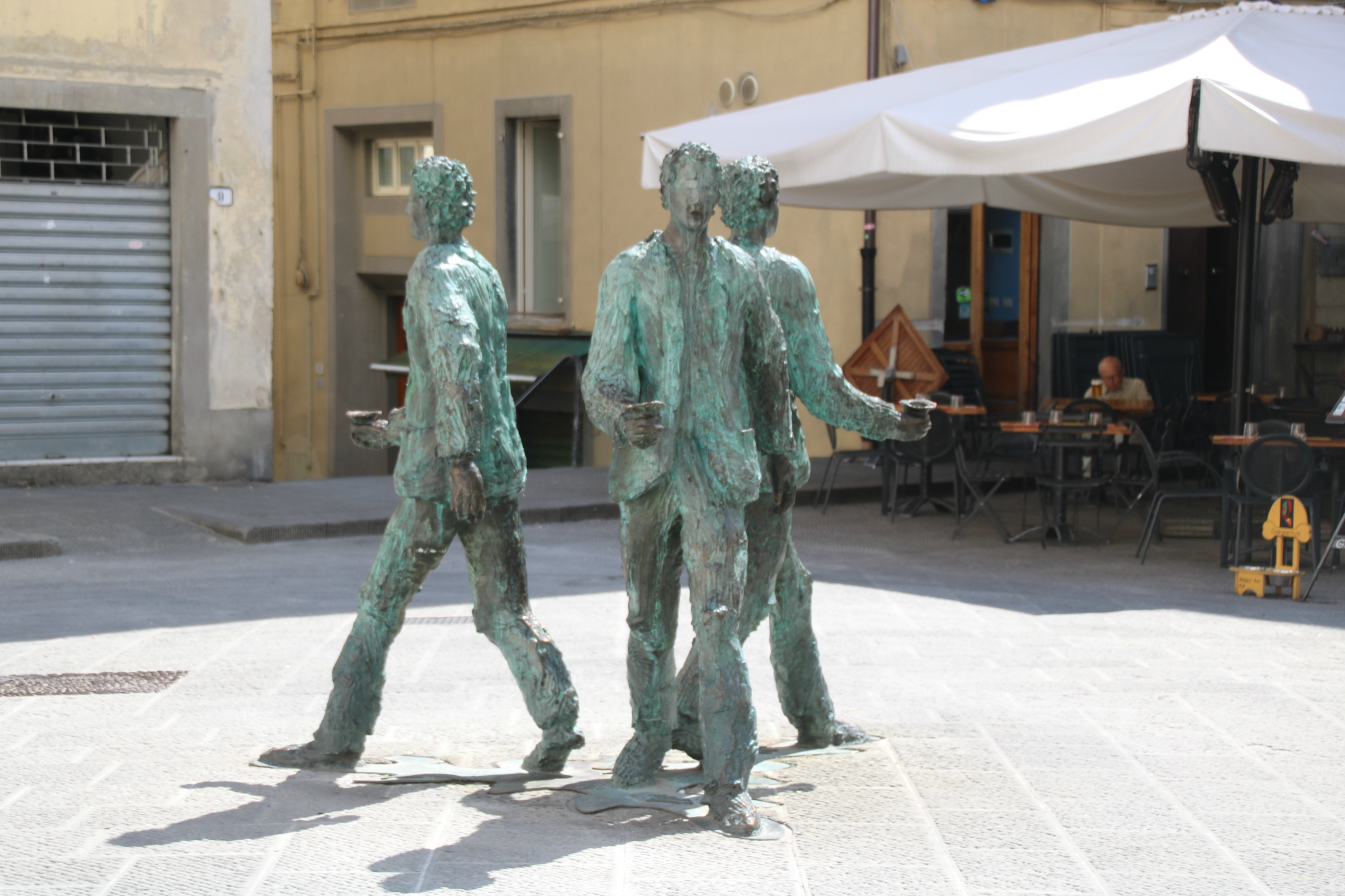 Giro del sole This is a photo of a monument which is part of cultural heritage of Italy.